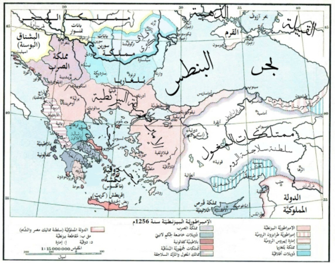 خريطة الإمبراطوريَّة البيزنطيَّة سنة 1265م.